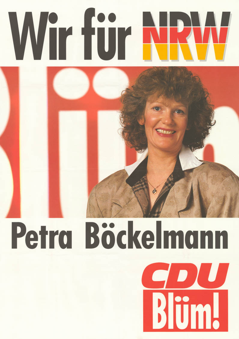 Wir für NRW Blüm Petra Böckelmann CDU Blüm! Abbildung: Porträtfoto - Nationalfarben Plakatart: Kandidaten-/Personenplakat mit Porträt Objekt-Signatur: 10-009 : 1113 Bestand: Landtagswahlplakate Nordrhein-Westfalen (10-009) GliederungBestand10-18: Landtagswahlplakate Nordrhein-Westfalen (10-009) » CDU Lizenz: KAS/ACDP 10-009 : 1113 CC-BY-SA 3.0 DE